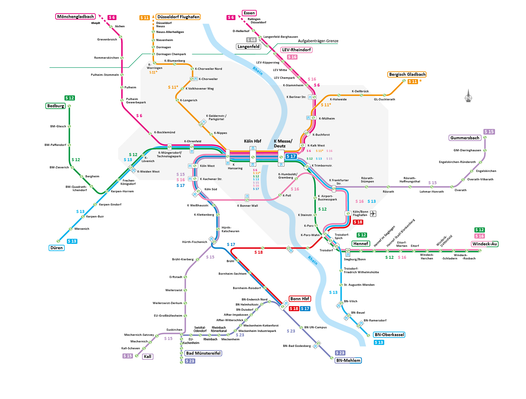 Geplantes Zielnetz der S-Bahn Köln im Jahr 2030, Stand: Mai 2020, Quelle: NVR